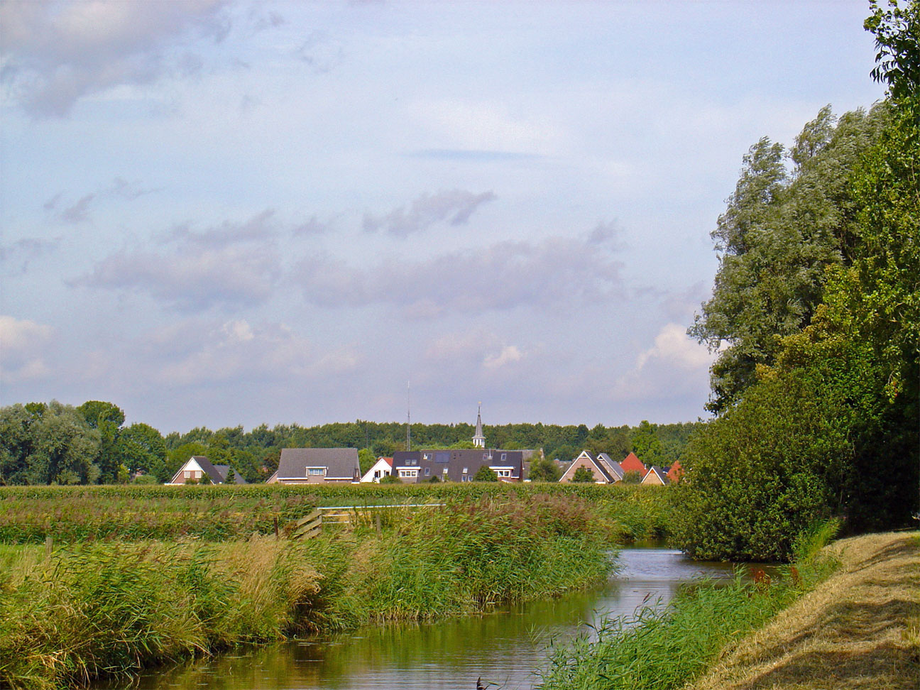 Garrelsweer in de gemeente Loppersum